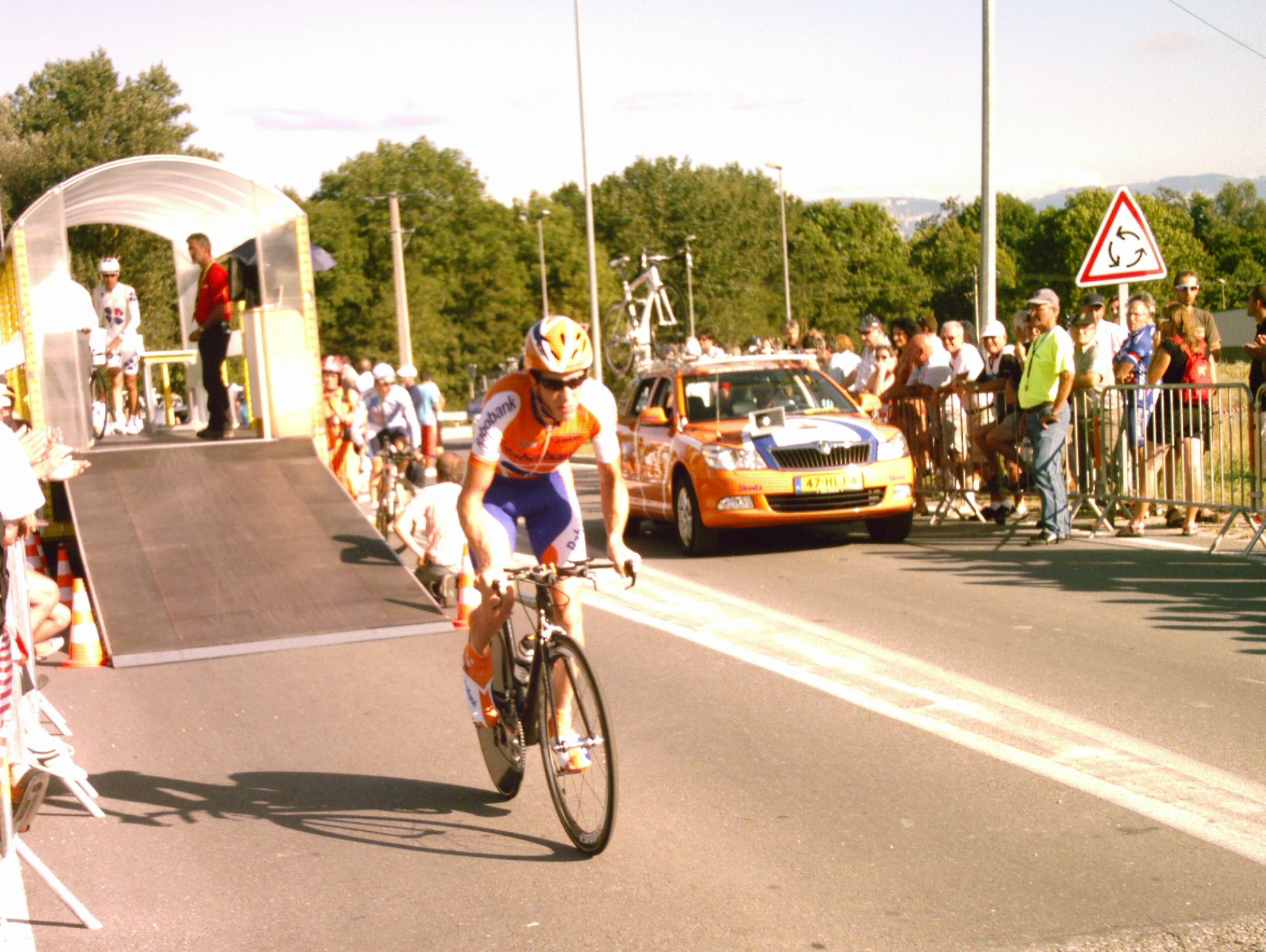 Thomas Rabou au départ du contre-la-montre de la troisième étape b du Tour de l'Ain 2009.